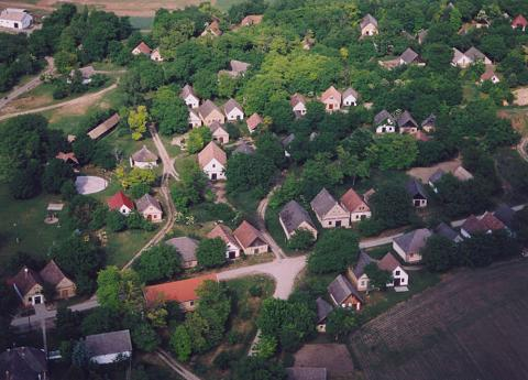 Györköny, Hungary, aerialphotography